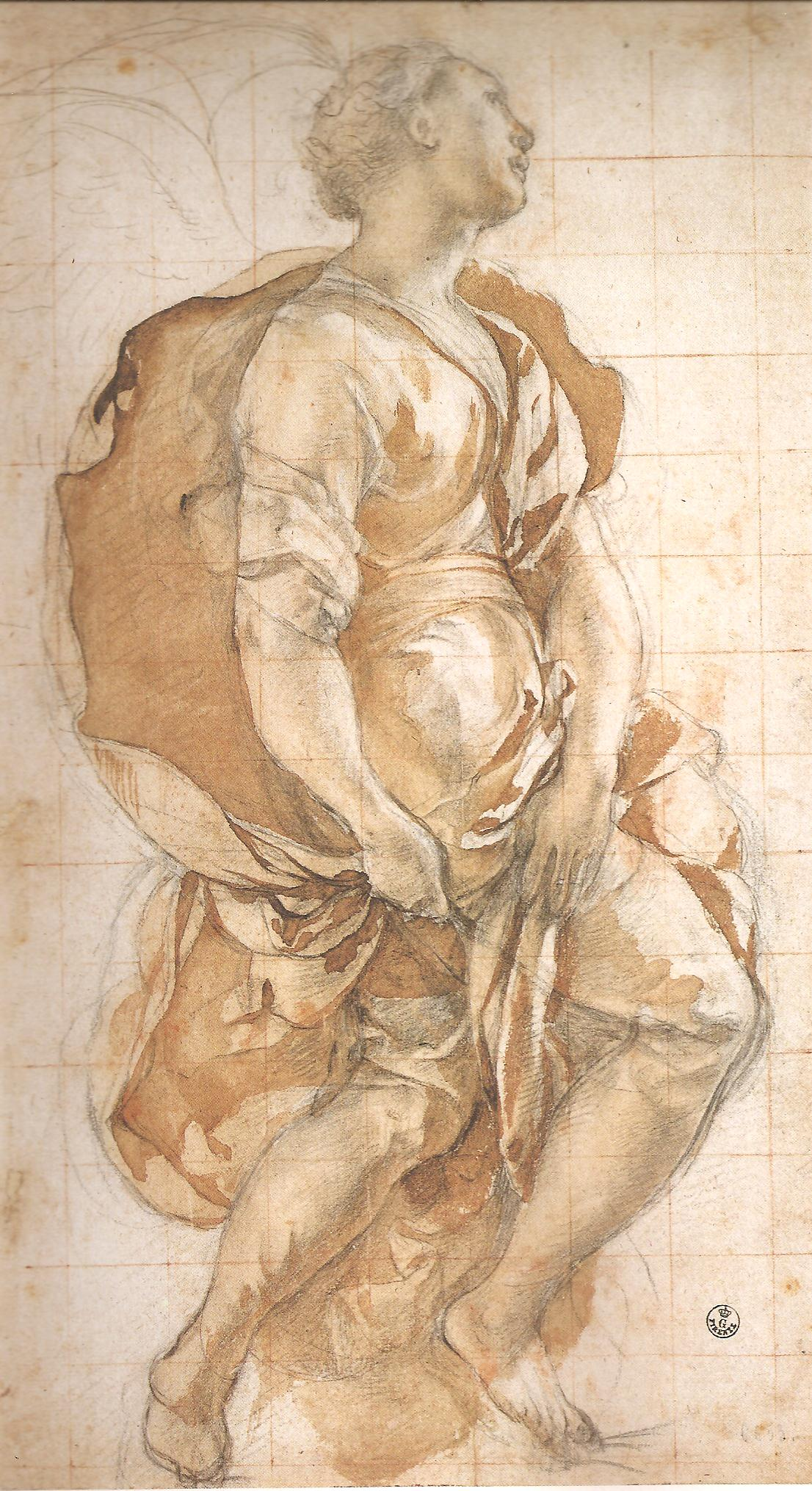 Disegno preparatorio di Jacopo Pontormo per l'affresco dell'annunciazione della Cappella Capponi in Santa Felicita a Firenze